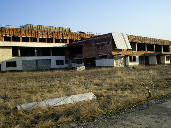 Аэропорт «Омск-Фёдоровка» в апреле 2007 года